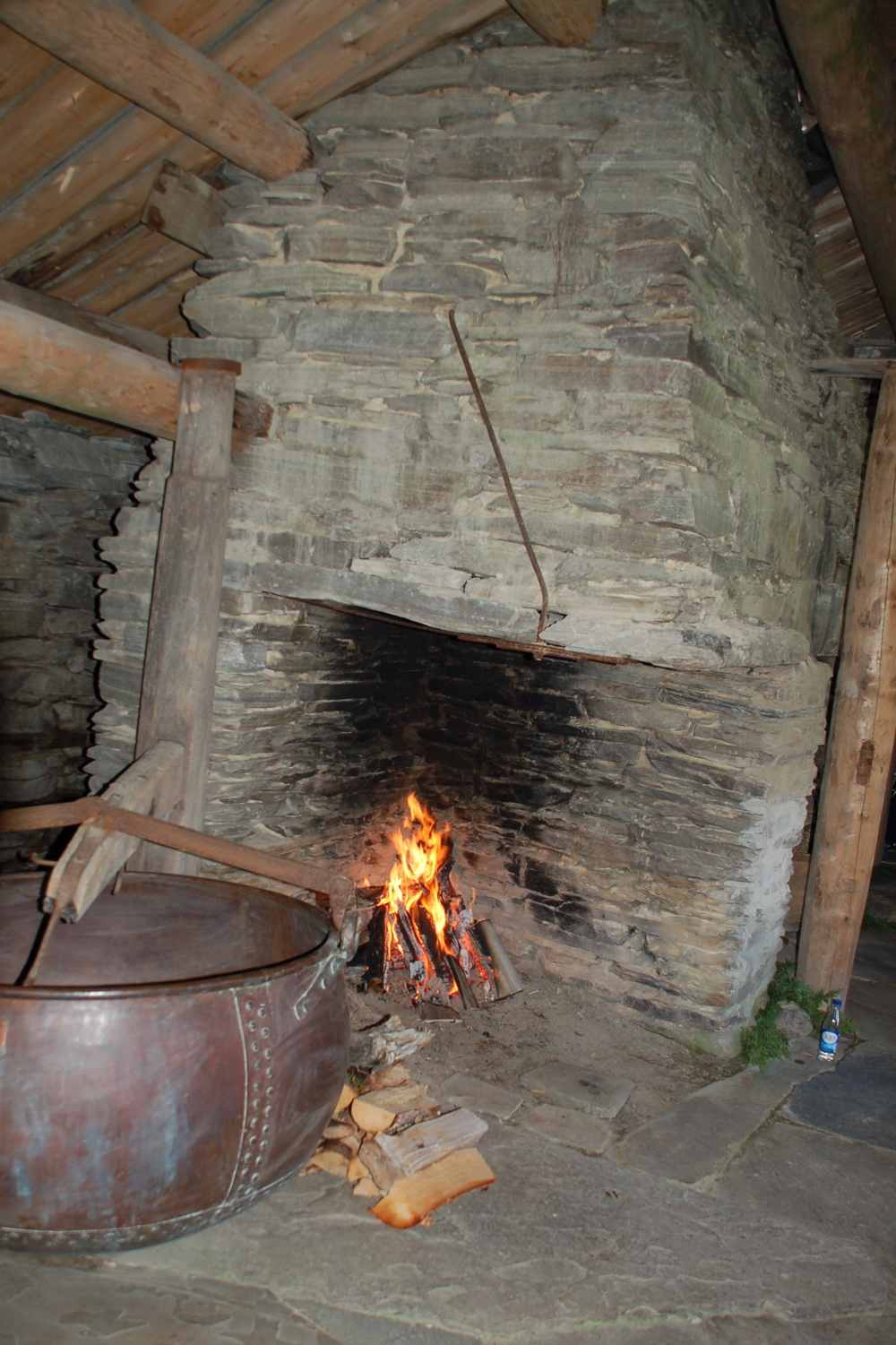 Rausjødalen Setermeieri, Tolga, Norway, Summer 2006